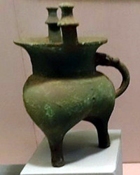 铜斝，现藏于甘肃省博物馆